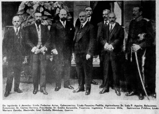 Gabinete del presidente Carlos Herrera y Luna.